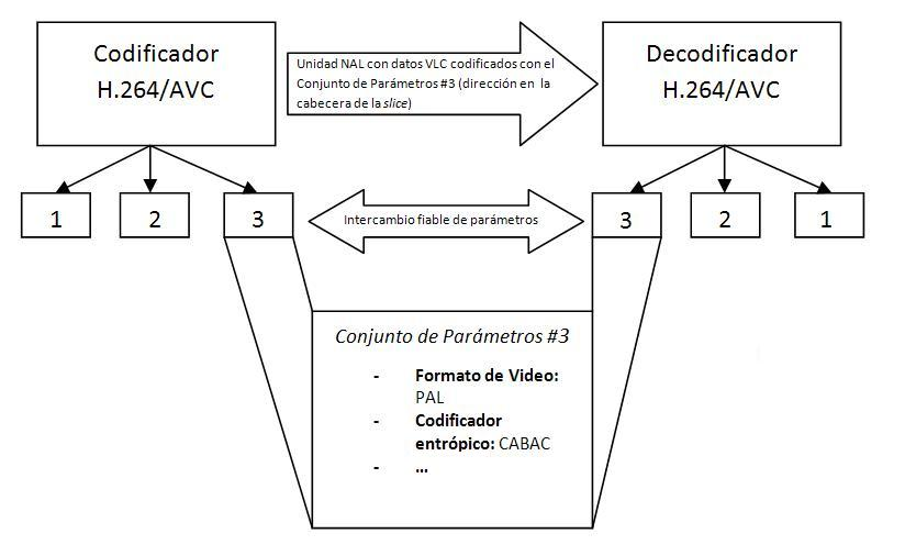 H.264/AVC Capa de Abstracción de Red. Uso de Conjunto de Parámetros en transmisión fuera de banda.